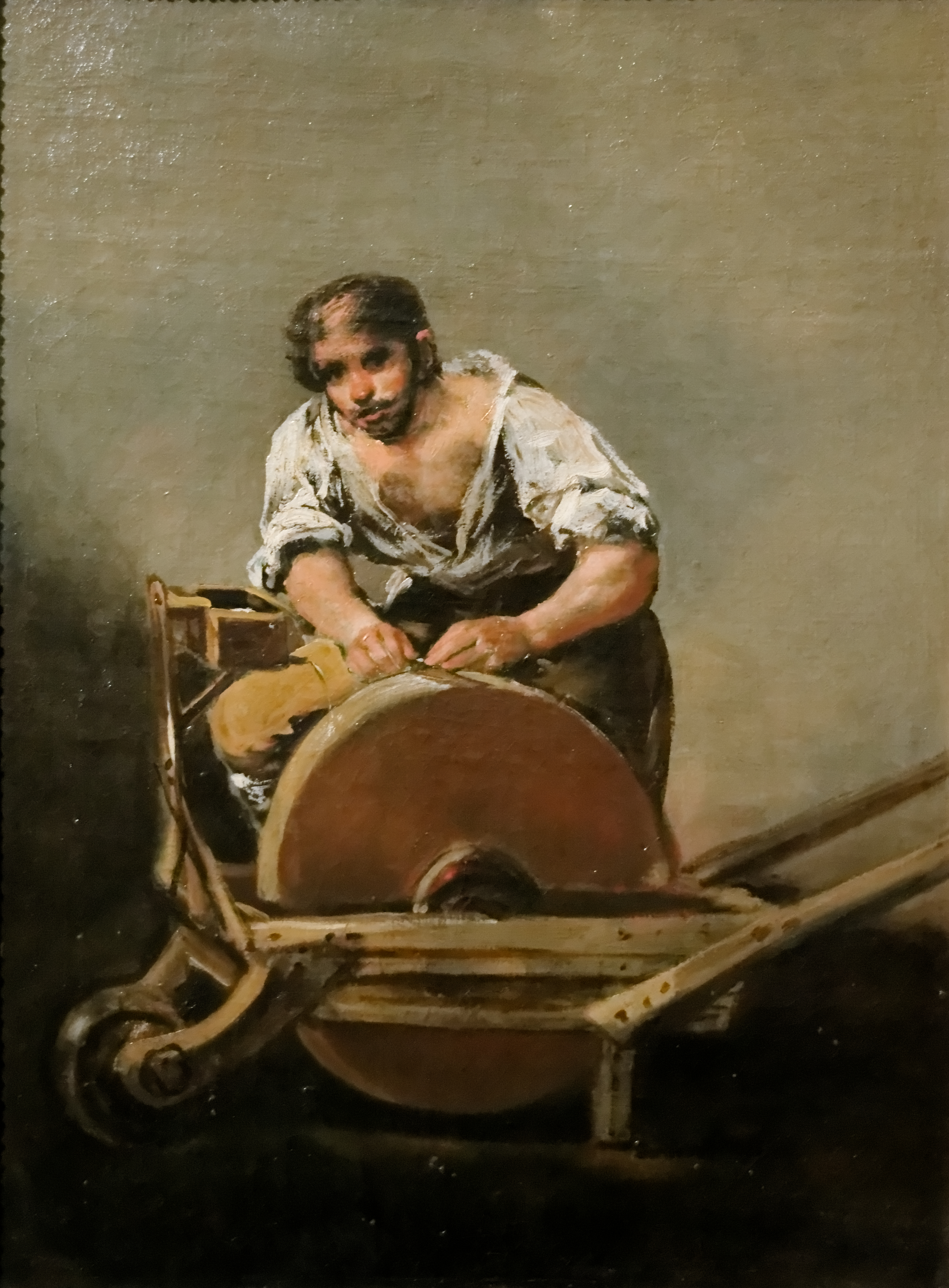 Grindstonelabel QS:Len,"Grindstone"label QS:Lfr,"Le Rémouleur"